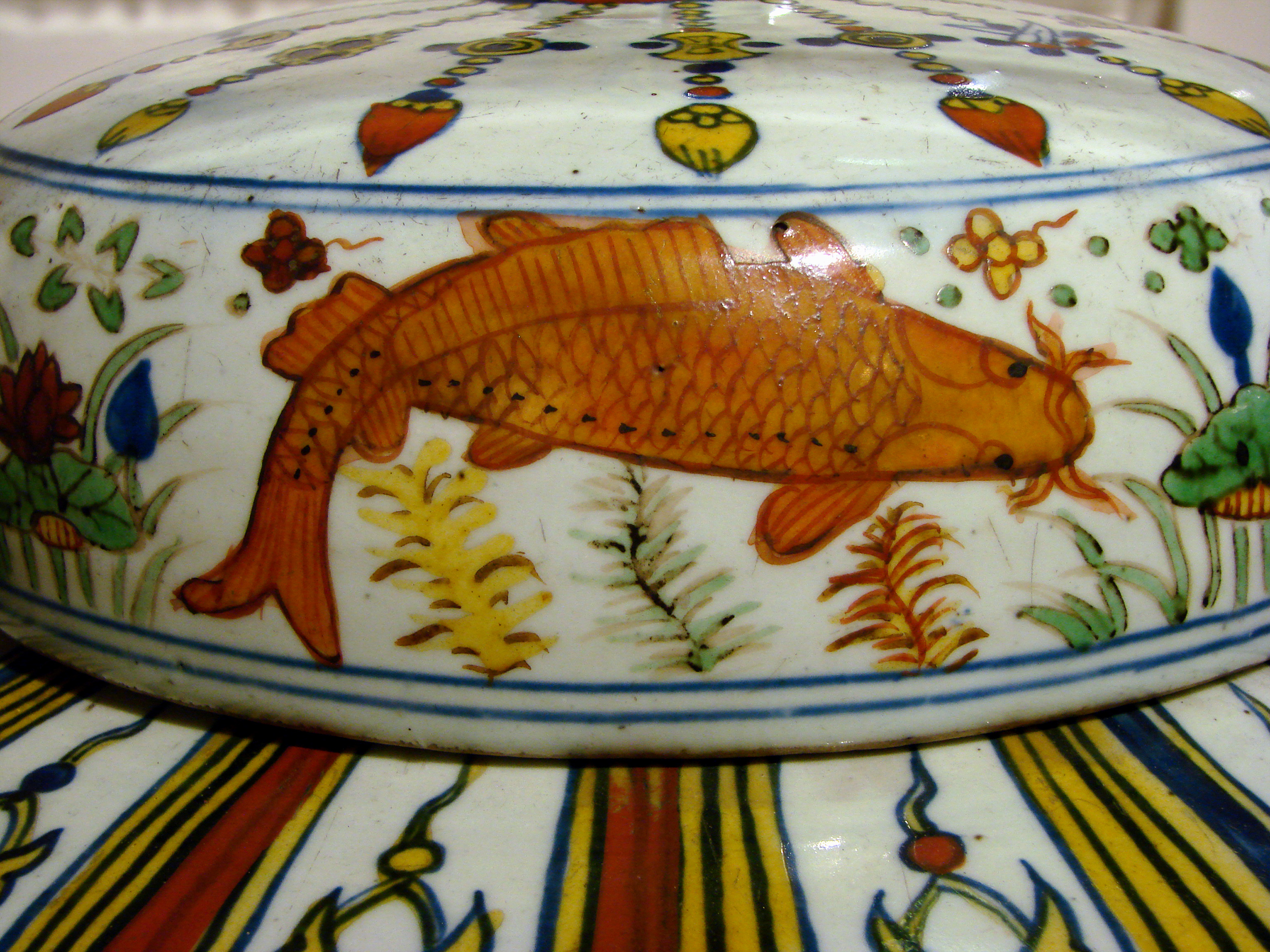 Détail d'une jarre à couvercle à décor de poissons rouges. Dynastie Ming, période jiajing (1522-1566). Musée Guimet, Paris.